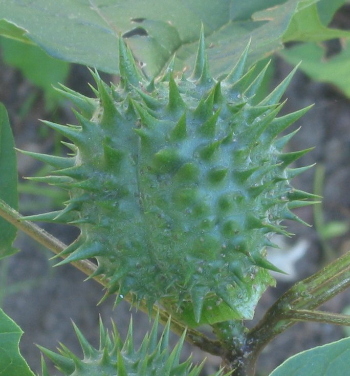 zelfgemaakte foto van vrucht van blauwbloeiende doornappel; begin september